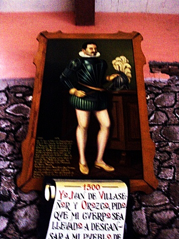 huascato